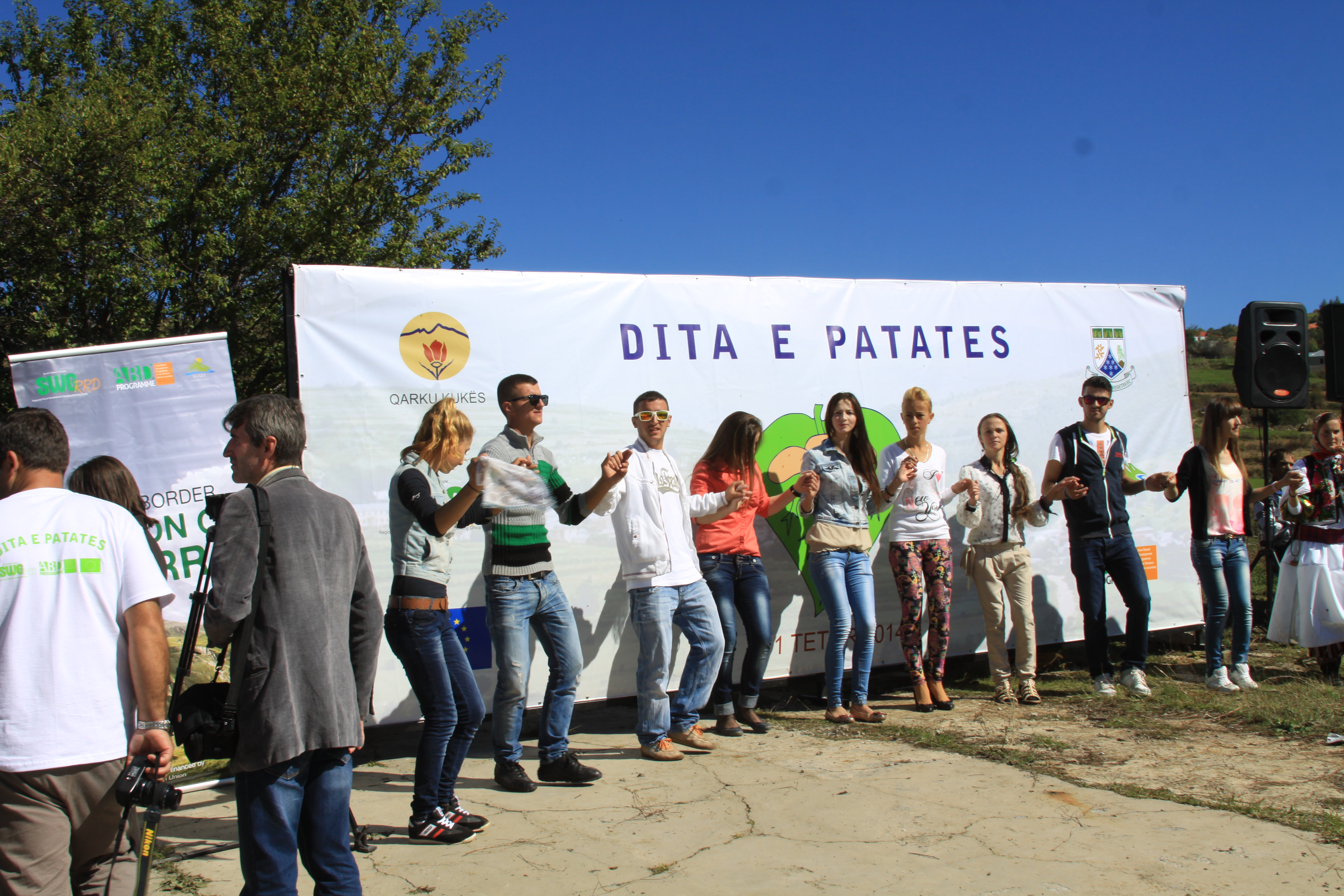 Festa e Patates organizohet ne Shishtavec nga prodhuesit e Patates